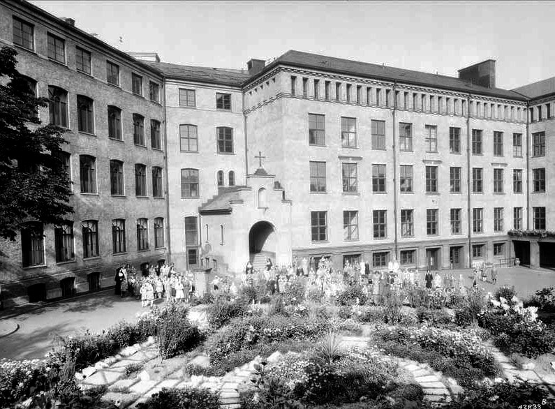 St. Sunniva skole, skolegård, hage, elever, nonner.